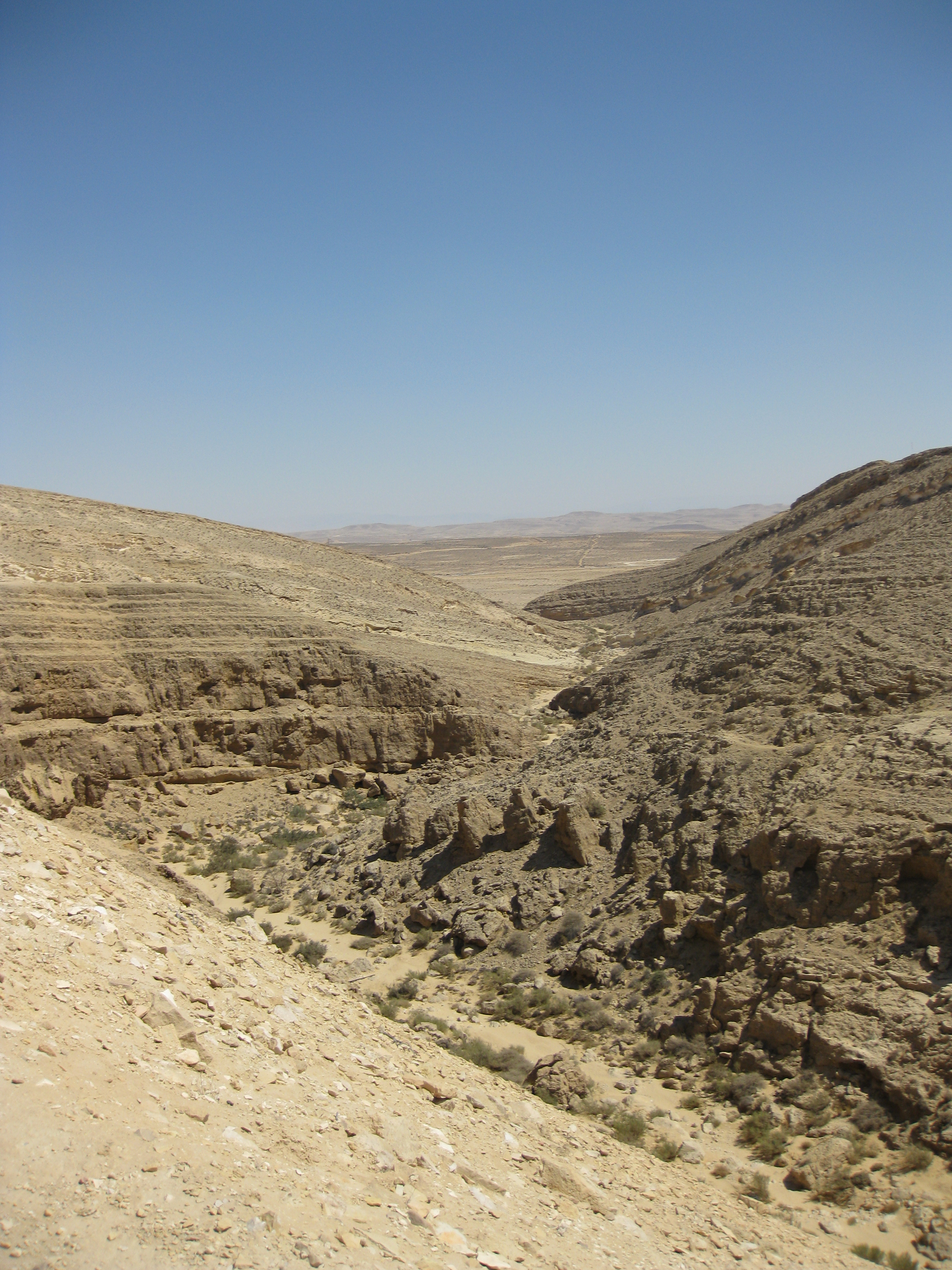 Mamshit Creek נחל ממשית